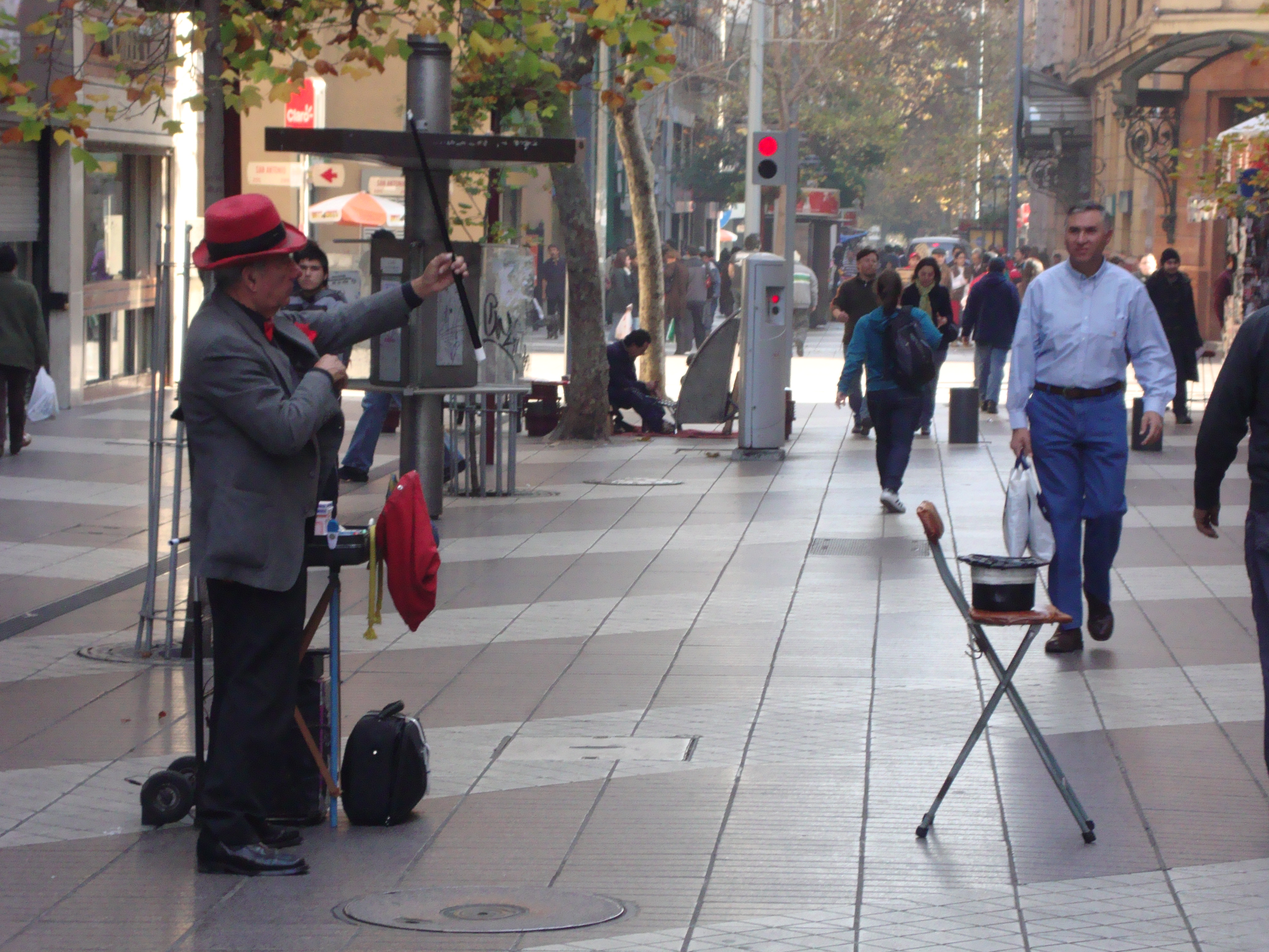 Imagen de magia callejera en Paseo Ahumada, Chile